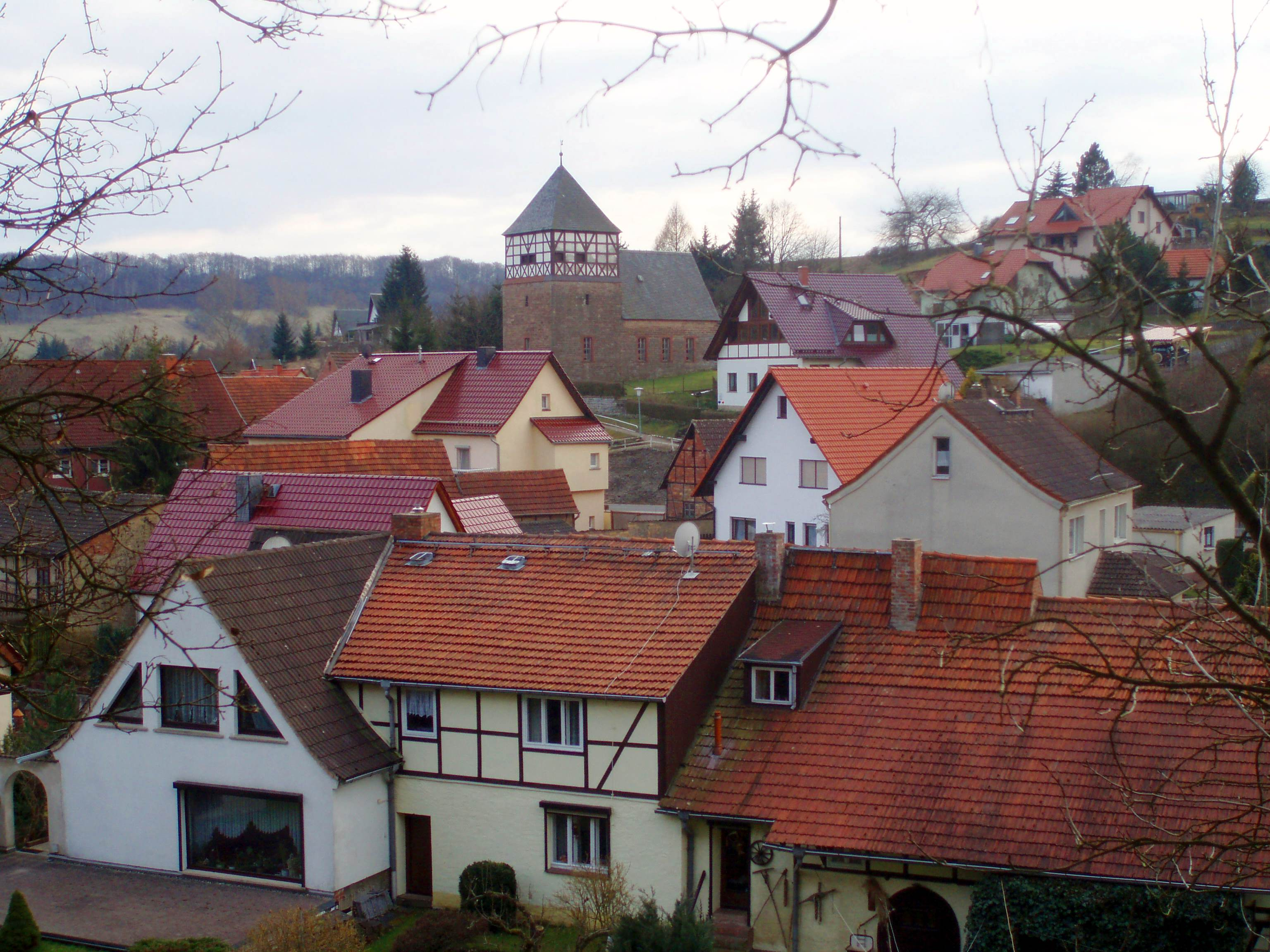 Blick zur Kirche Grillenberg